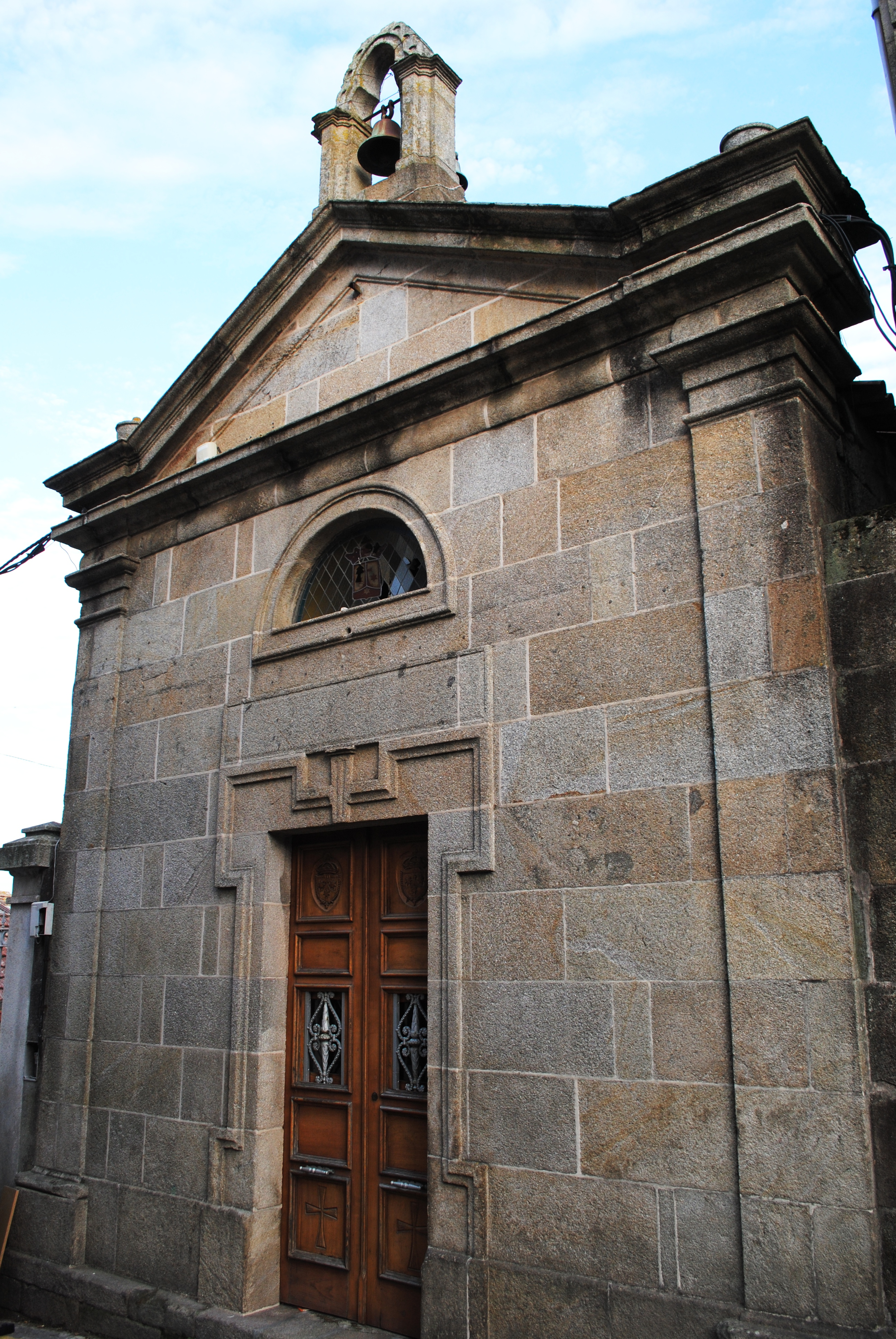 Capela da N. S. do Carme, rúa Ferreiros, Bouzas, Vigo.